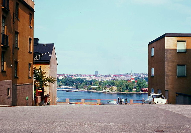 Vy från Lilla Erstagatans krön åt norr mot Kastellholmen